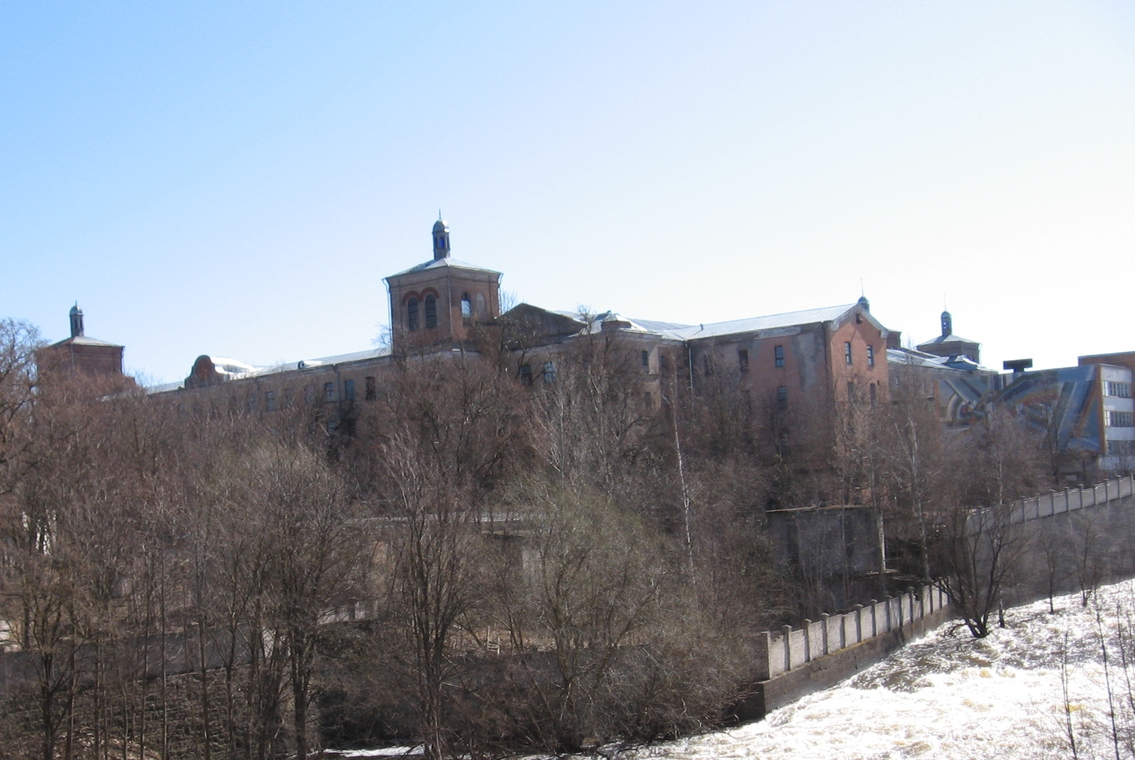 Kreenholmi ketrus- ja kudumisvabriku vana hoone